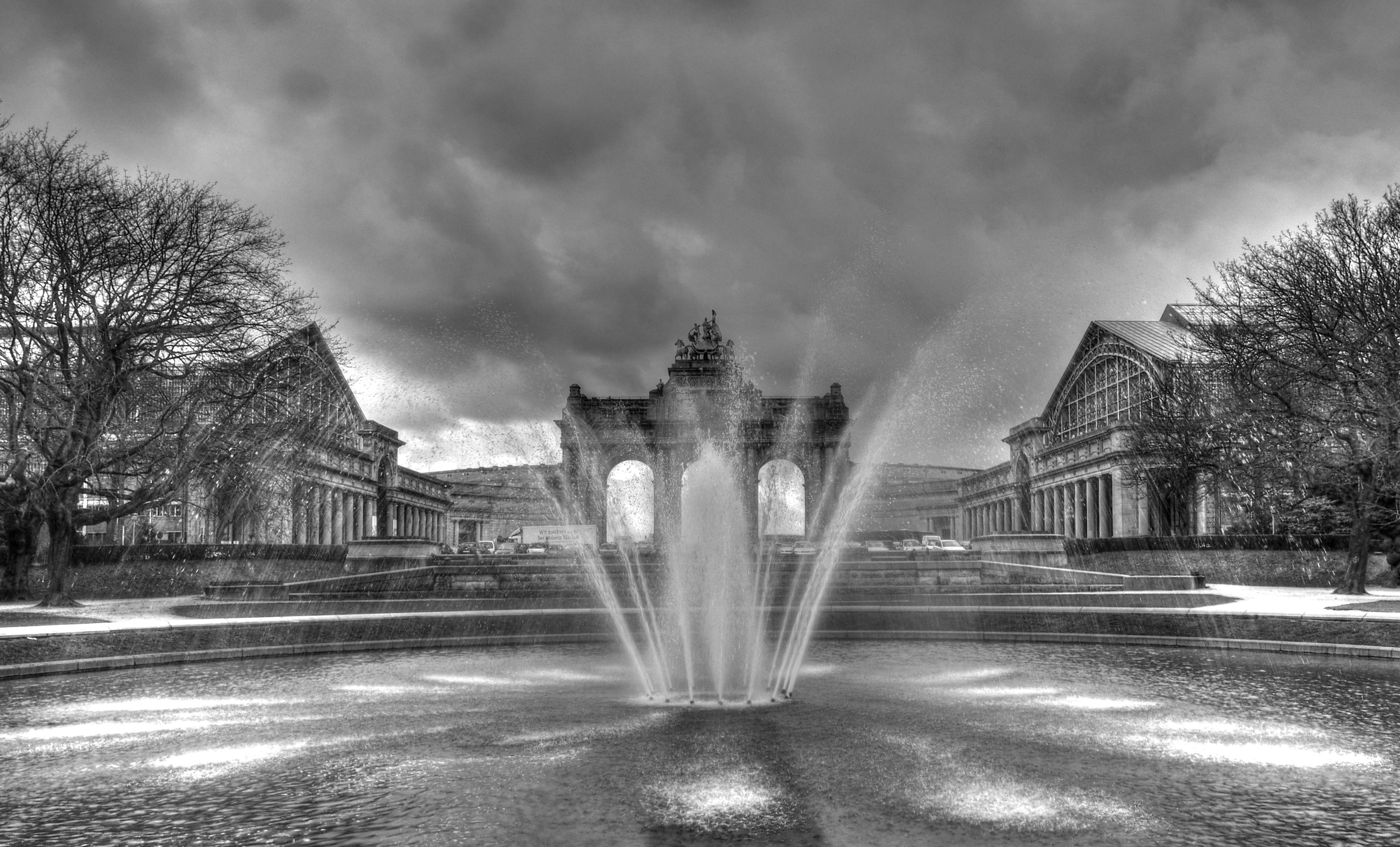 La fontaine et les arcades sous un ciel d' orage